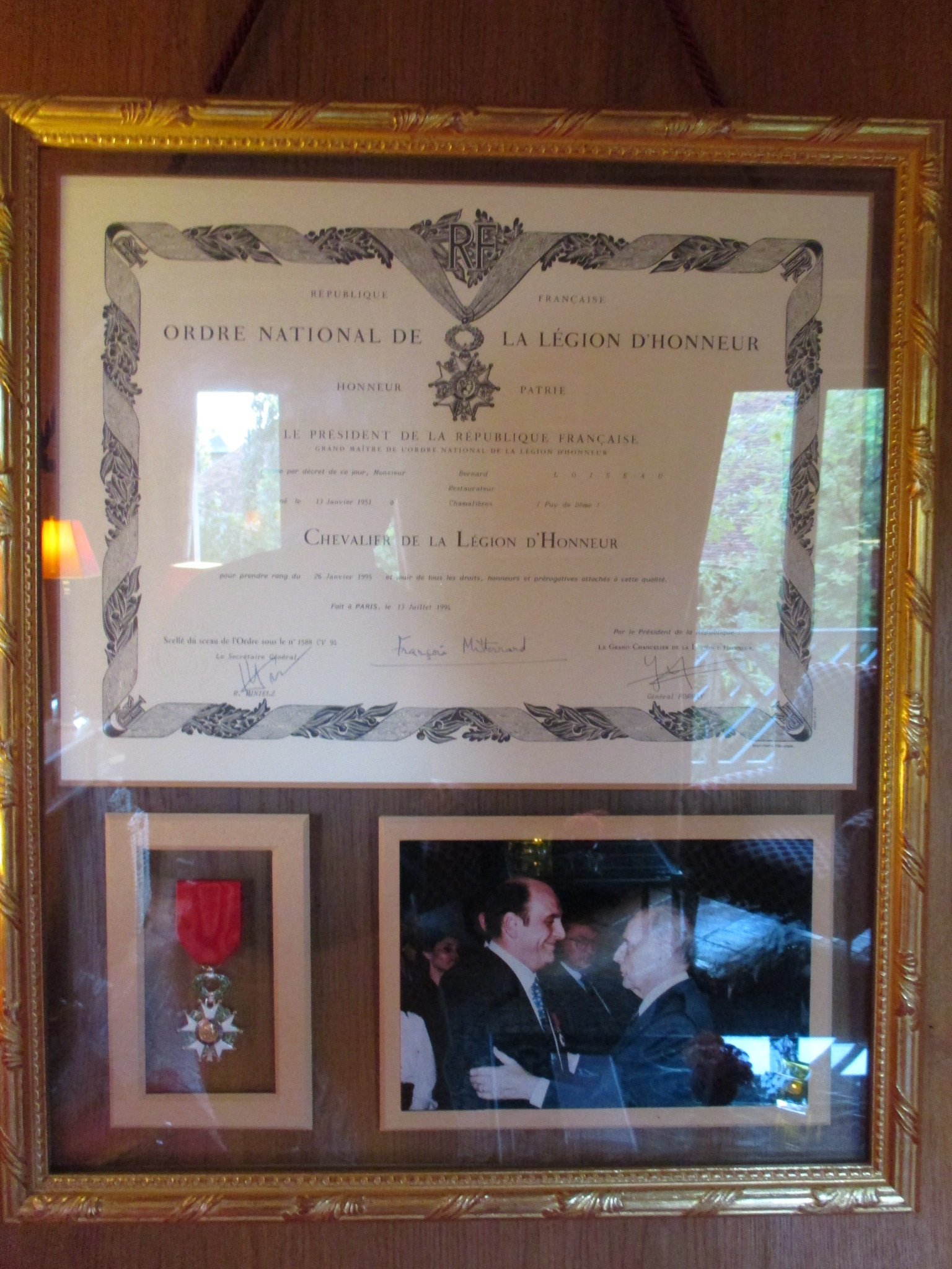 Certificat de Chevalier de la Légion d'Honneur de Bernard Loiseau, au restaurant Relais Bernard Loiseau à Saulieu